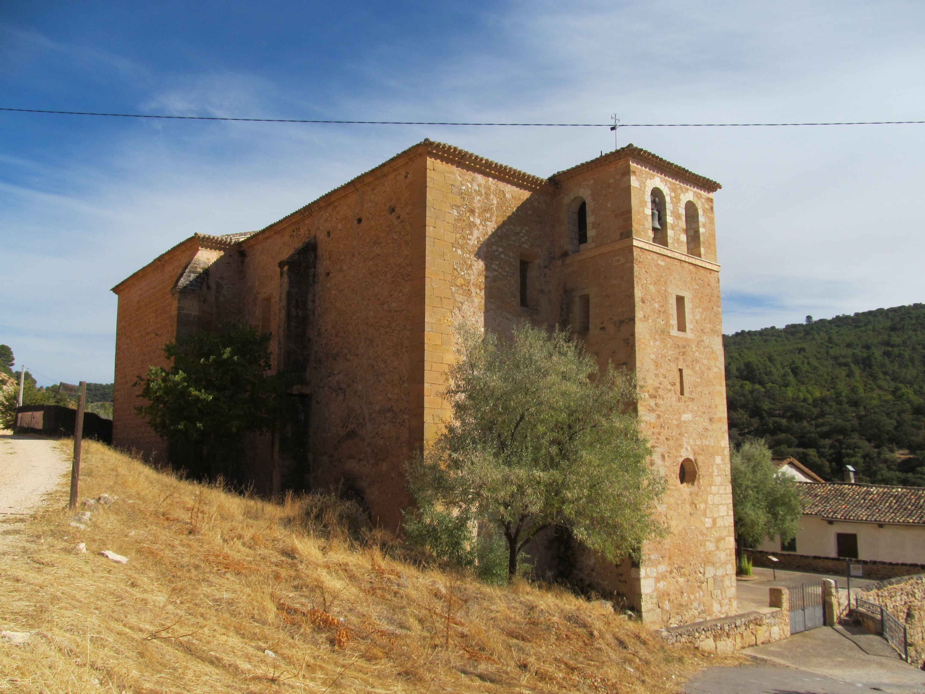 Chillarón del Rey - La iglesia de Nuestra Señora de los Huertos fue construida en el siglo XVI, presenta un exterior renacentista. Se asienta sobre la falda de una pequeña ladera.